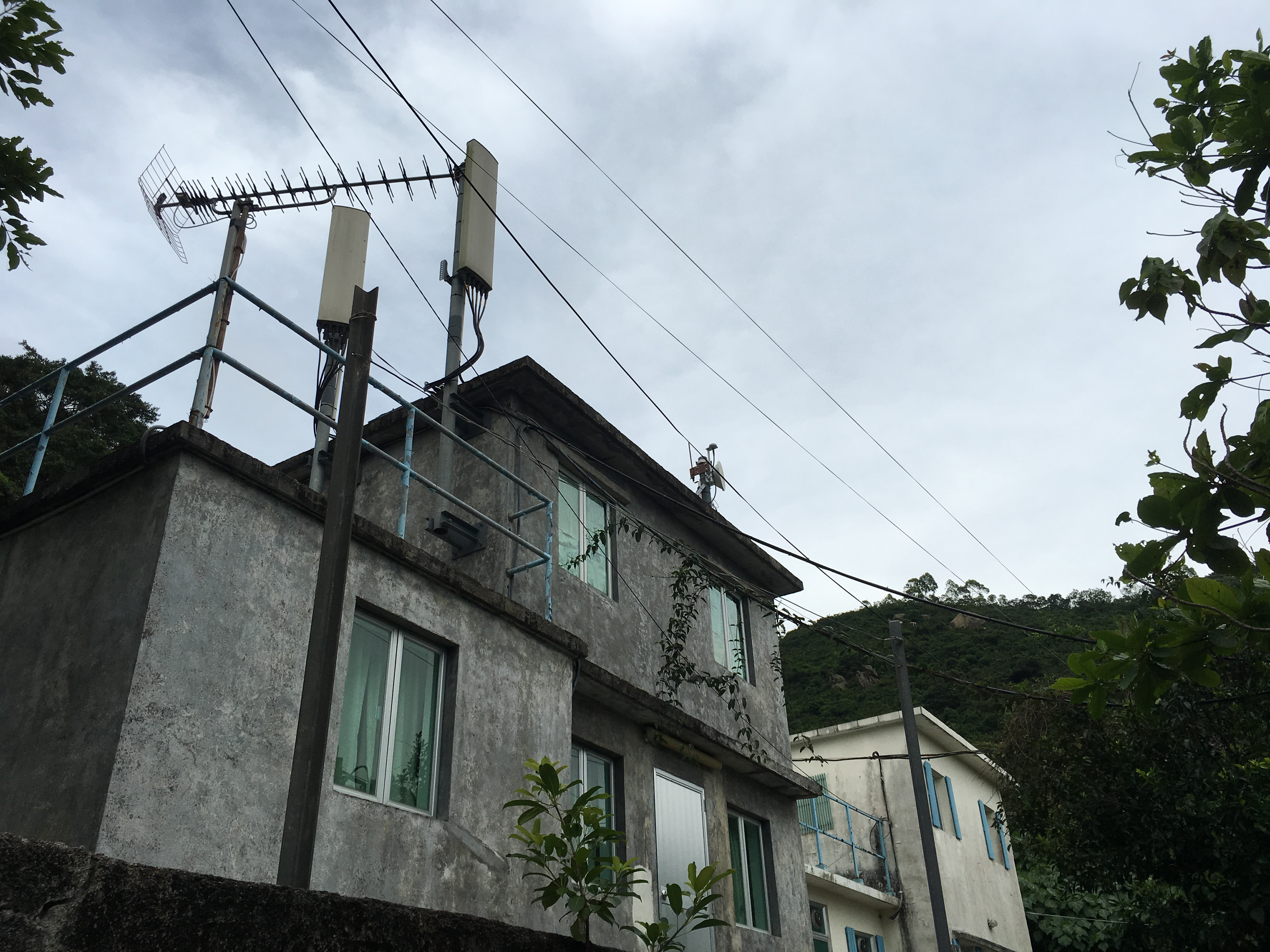 土地灣村的民房